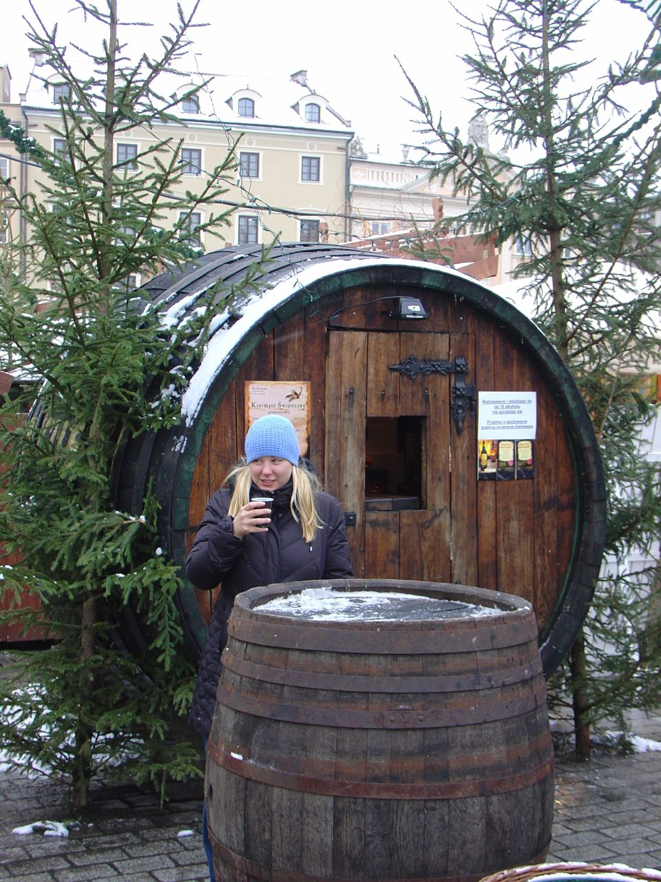 Dégustation de vin chaud et épicé à Cracovie